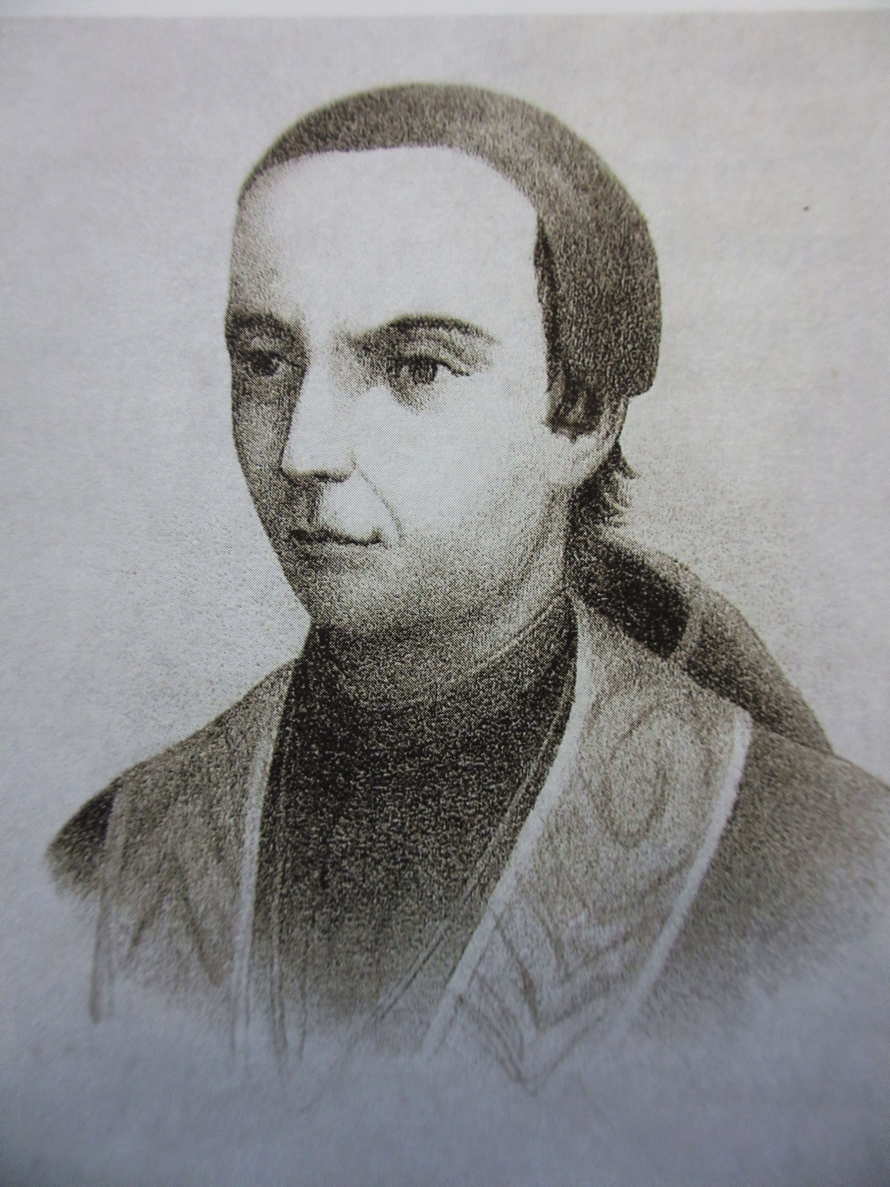 José Eduardo de Cárdenas y Romero. Presbítero que nació en la ciudad de Cunduacán, estado de Tabasco, México. Fue electo Diputado por Tabasco ante las Cortes de Cádiz, España en 1810, donde presento un discurso titulado "Memoria de la Provincia de Tabasco" y "Exposición de Motivos de la Guerra de Independencia". Luchador incansable por los derechos de los tabasqueños, fund{o la ciudad de Cárdenas, Tabasco y luchó siempre por la separación de Tabasco de Yucatán.